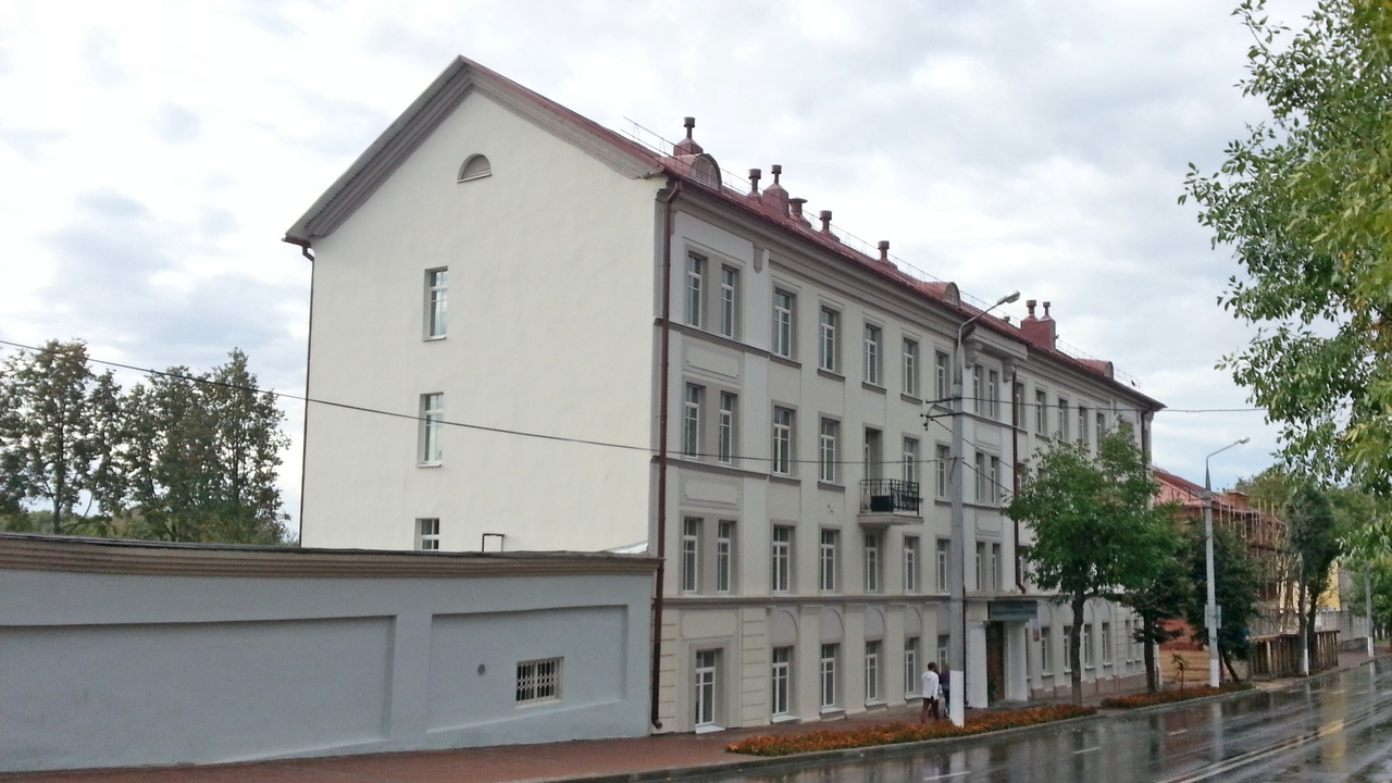 Беларуская (тарашкевіца): Забудова вул. Калініна. г. Віцебск This is a photo of Belarusian heritage monument. Reference number: 213Г000033 ( WLM)